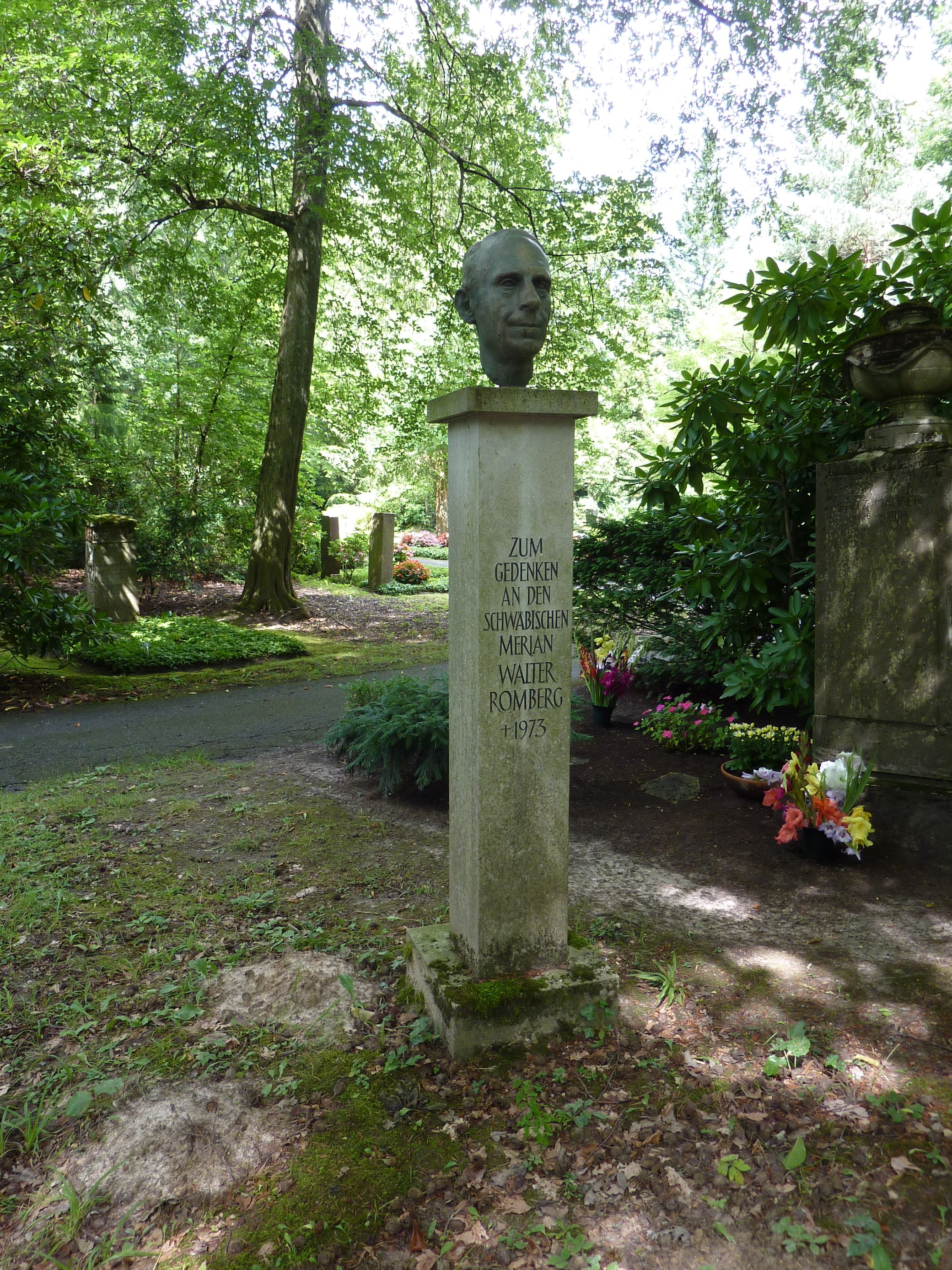 Stele mit Porträt Walter Rombergs auf dem Stuttgarter Waldfriedhof